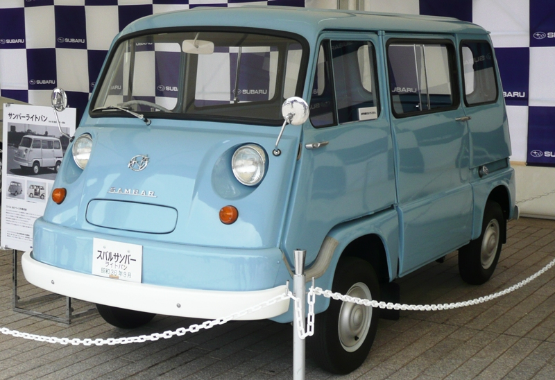 Subaru Sambar 1st generation.